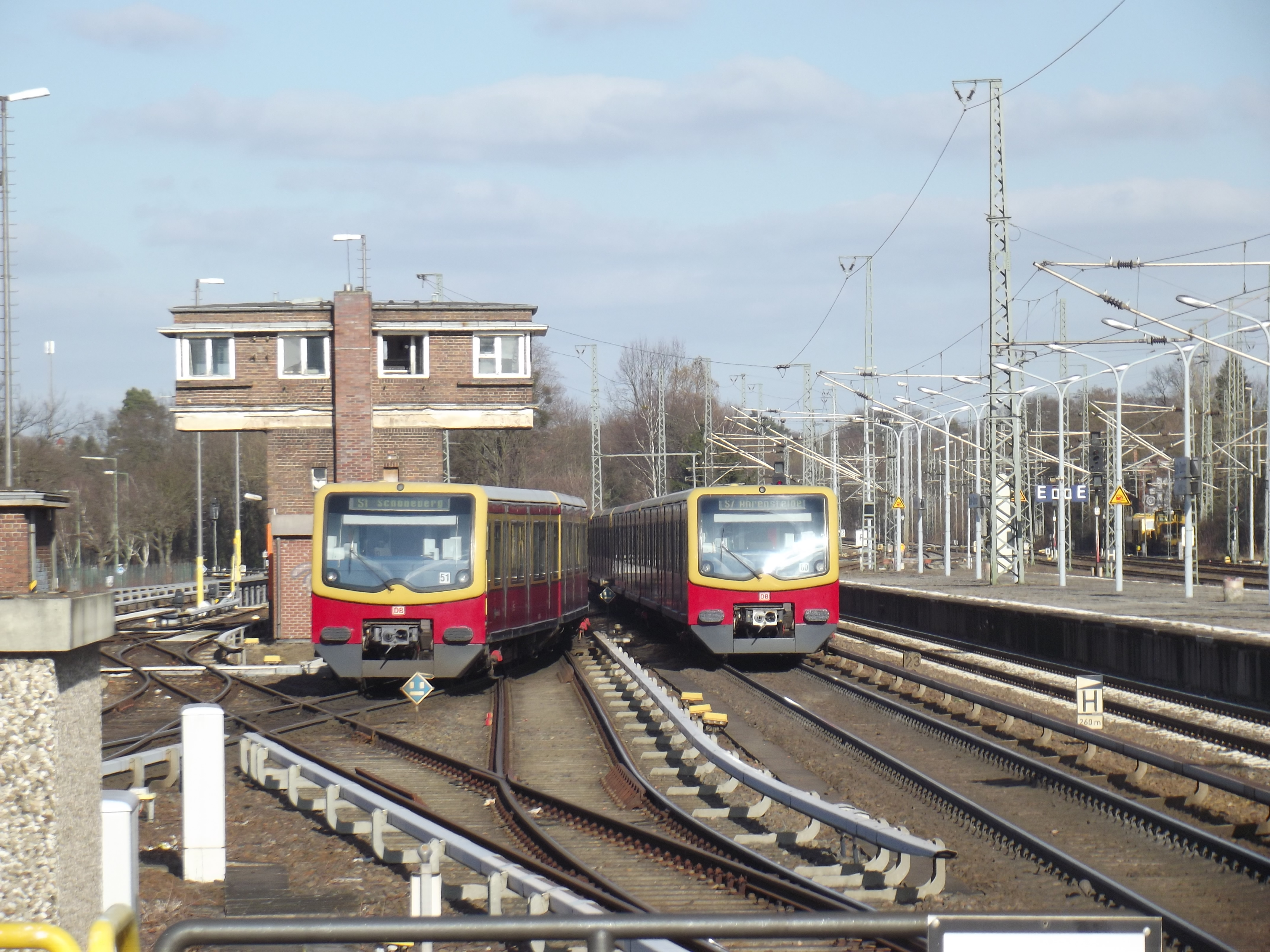 De S1 en S7 S-Bahn lijnen komen samen in Berlijn-Wannsee